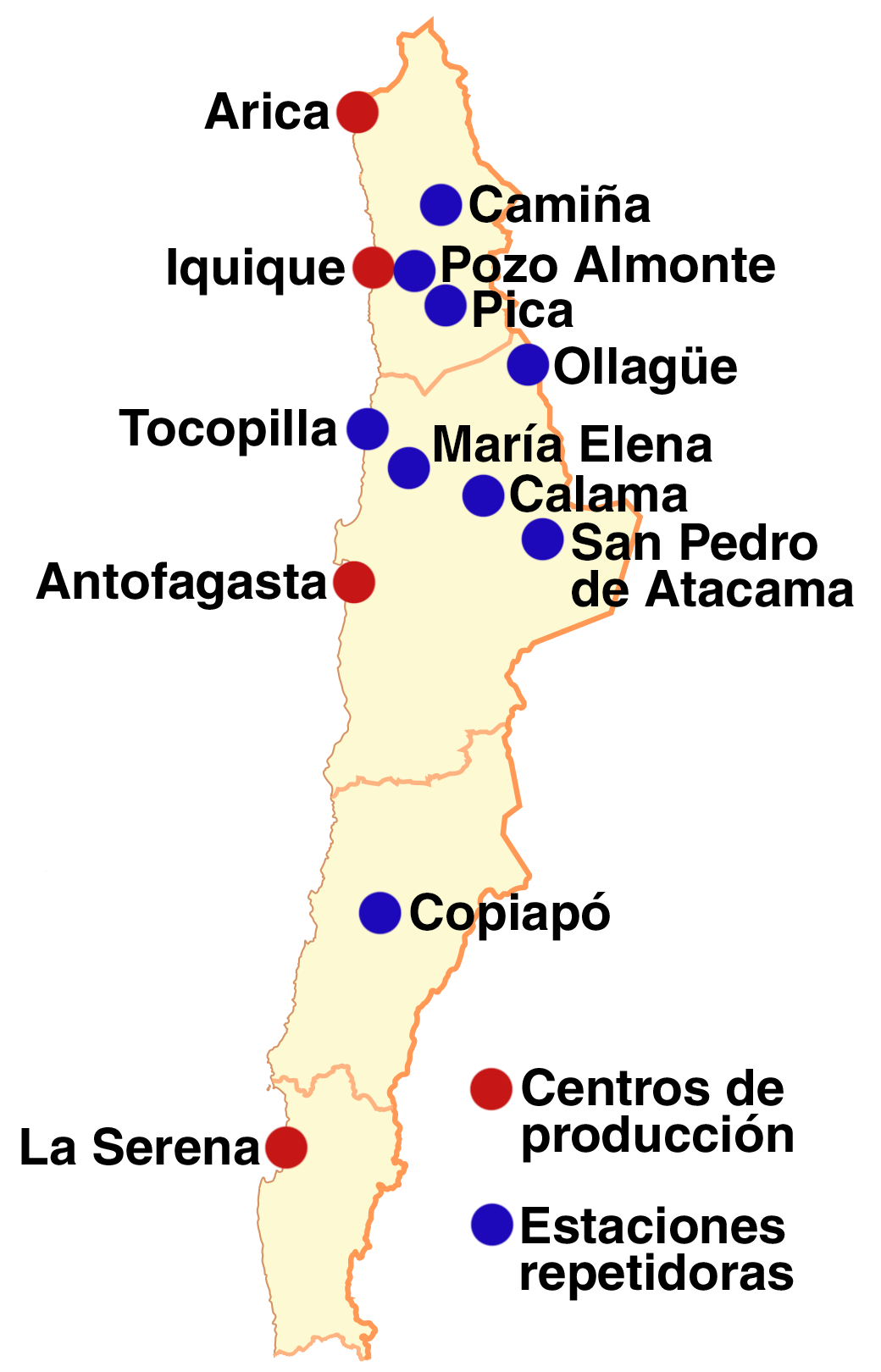 Señales pertenecientes a Telenorte a mediados de los años 90s.